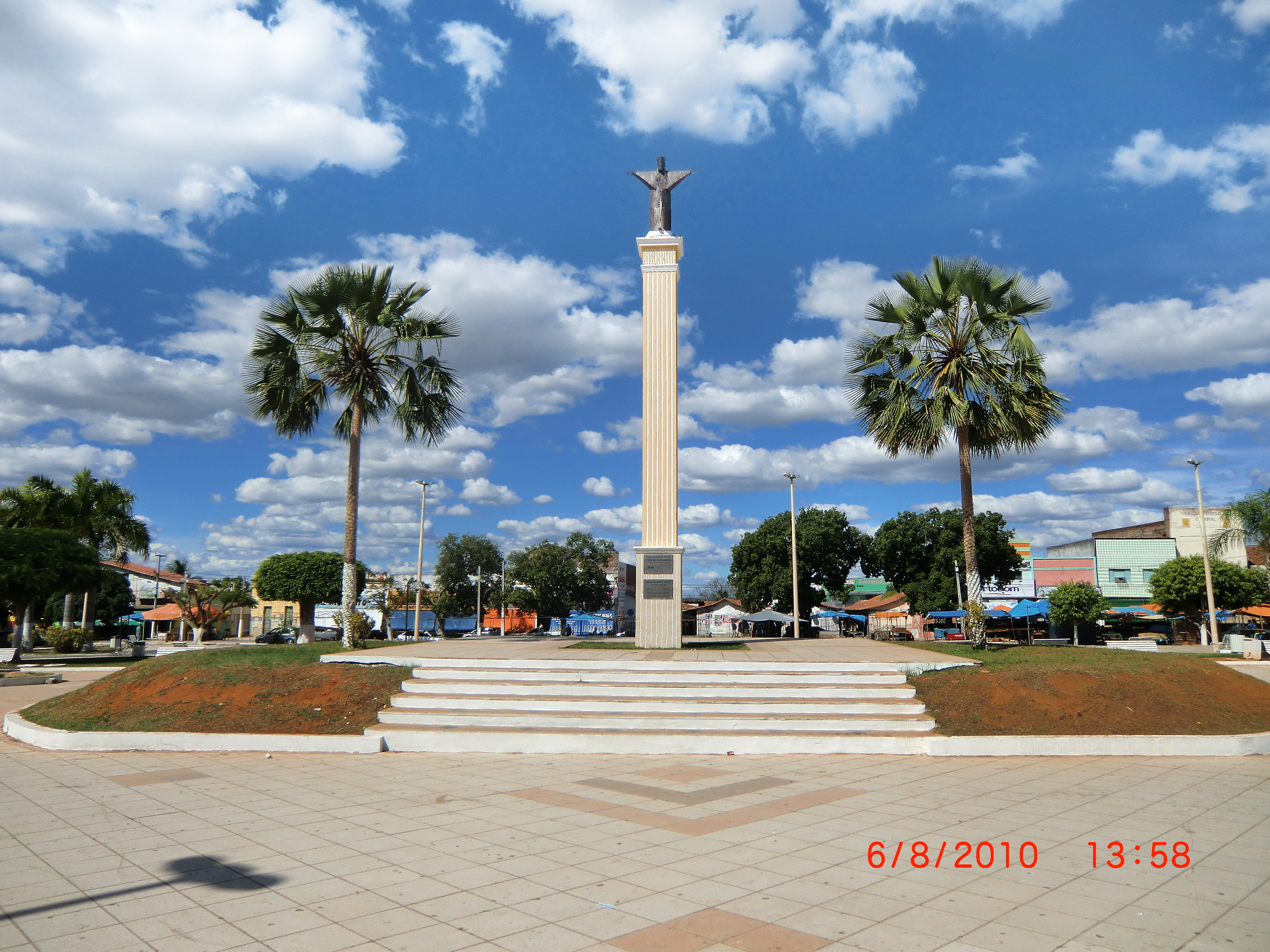 Marco - Praça São João Batista - Açu (RN)